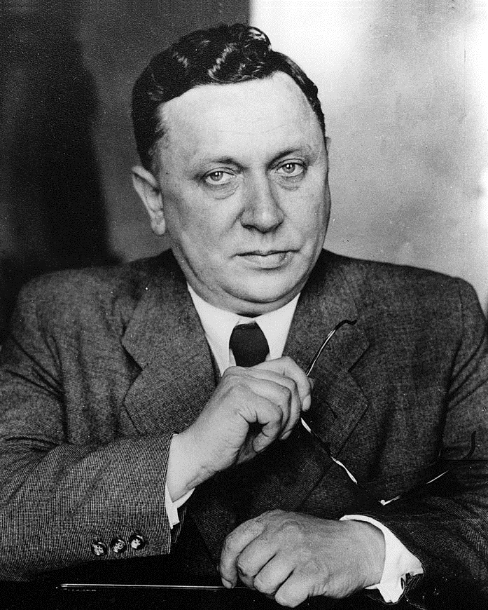 Kurt Alder